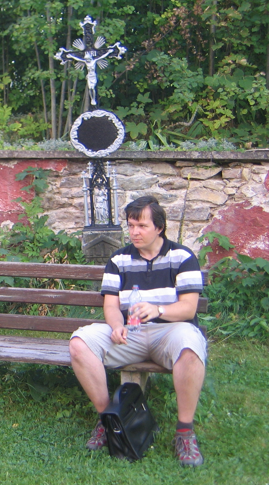 PhDr. Jan Lhoták při toulkách milovaným Pošumavím.